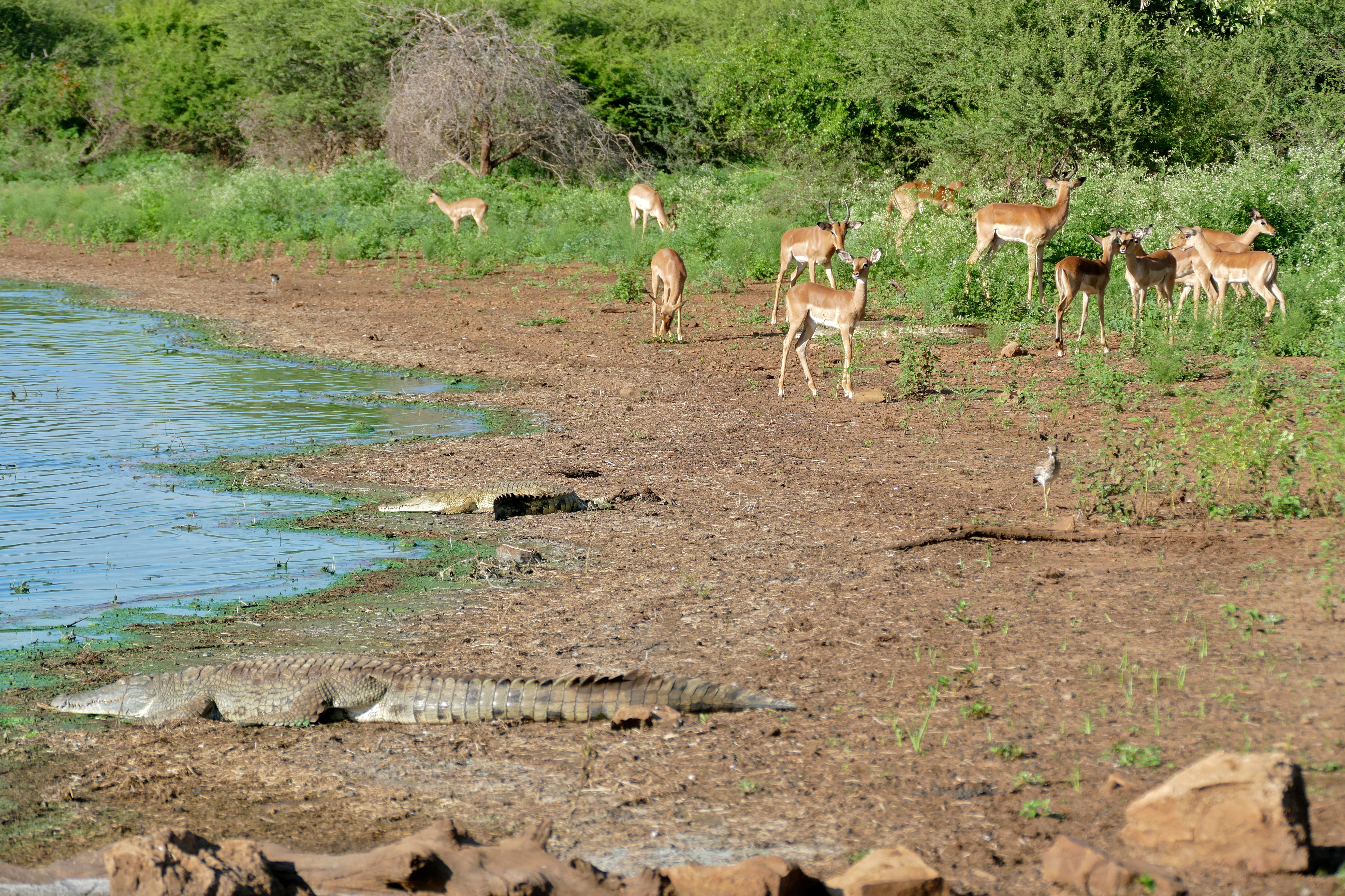 Sunset Dam, Lower Sabie, Kruger NP, SOUTH AFRICA